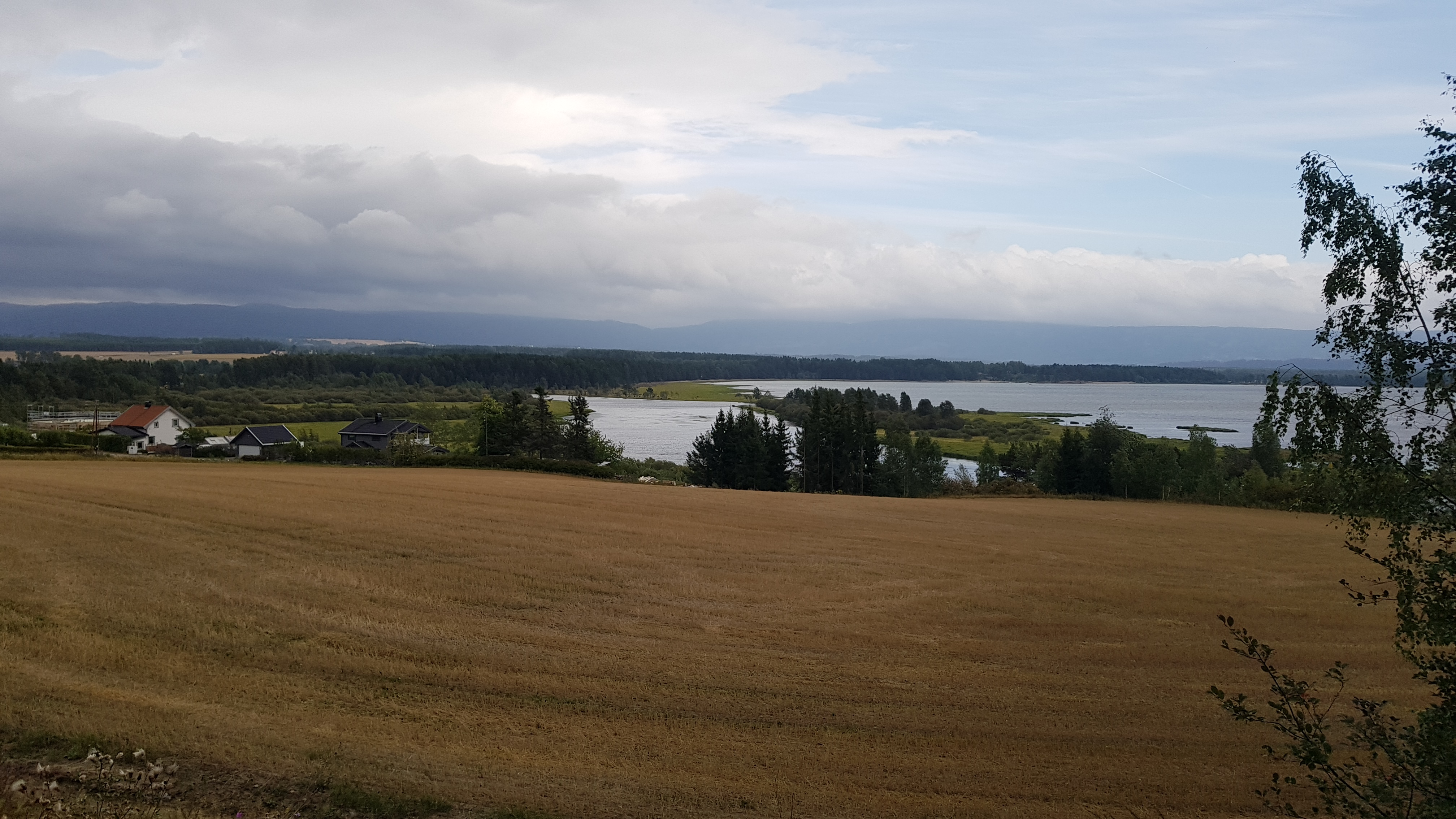 Kalsrudtangen og utløpet av Sogna, lengst nord i Nordfjorden (Tyrifjorden)